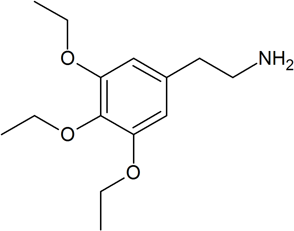 Trisescaline